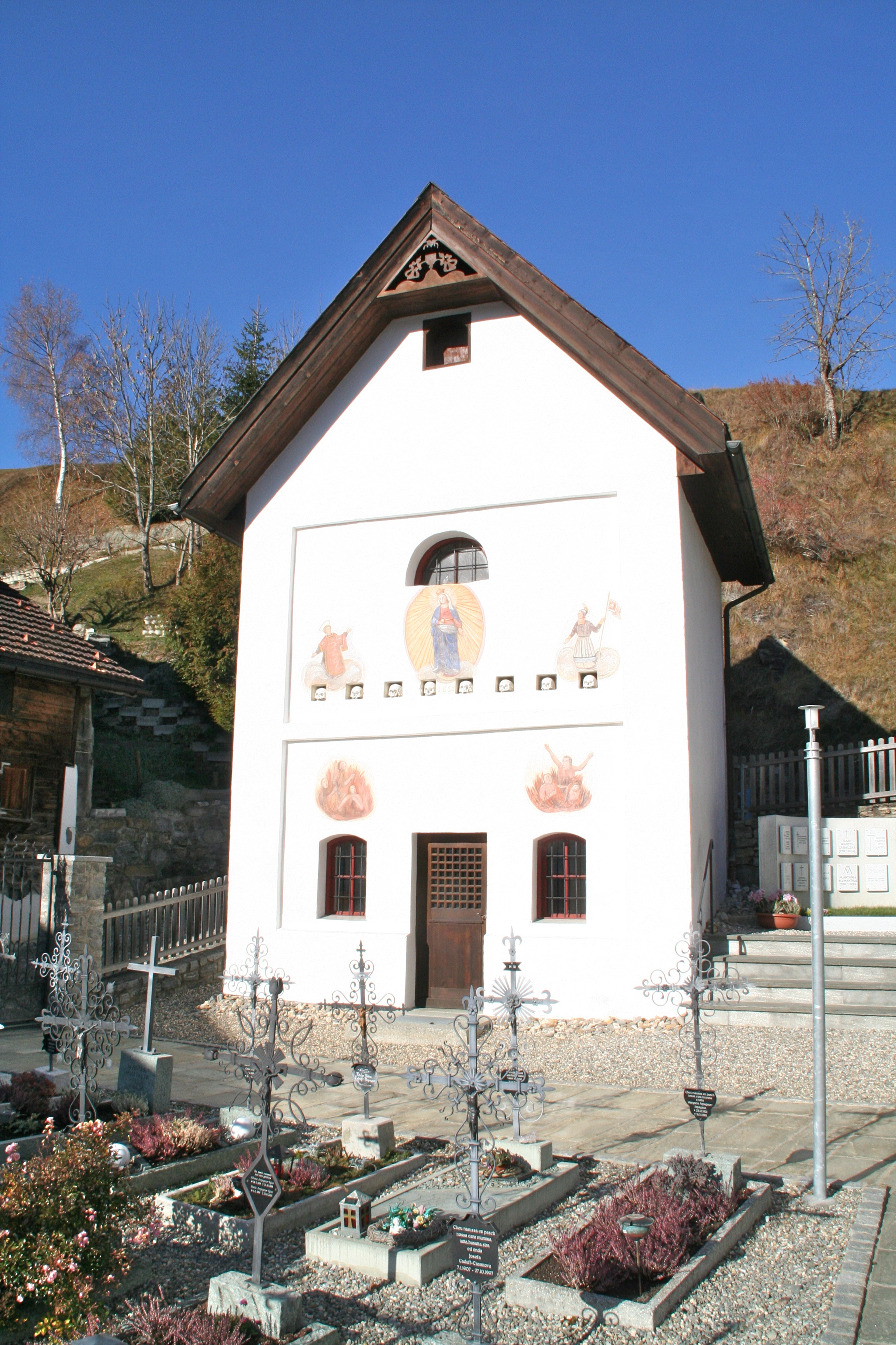 Kirche St. Stephan (Cumbel) Beinhaus